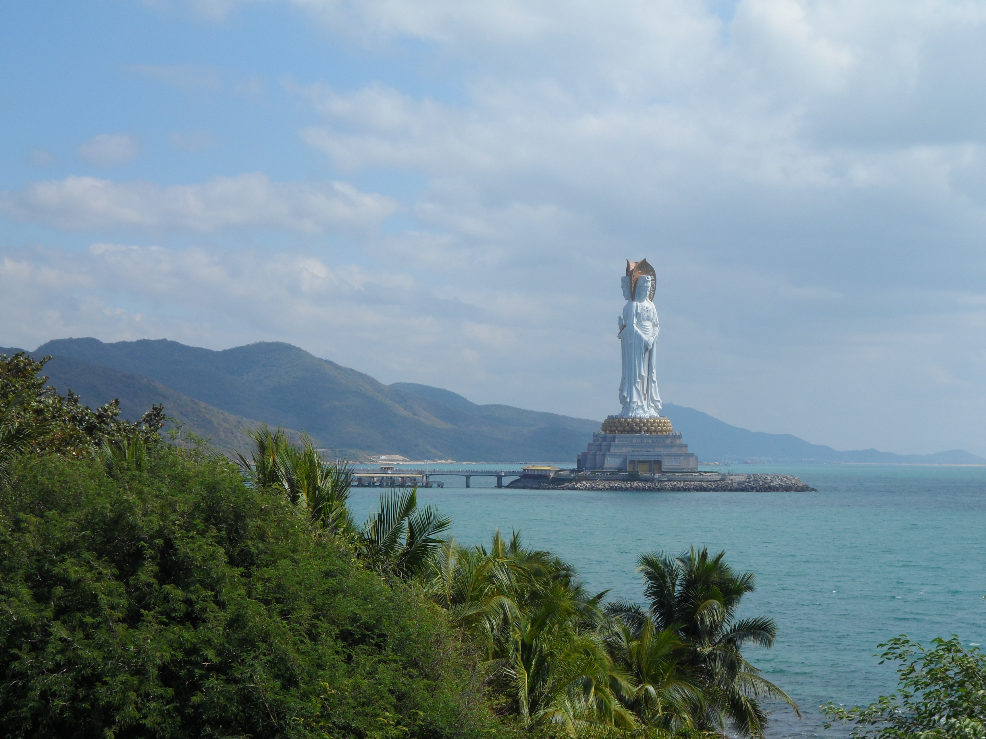 海南三亚南海观音